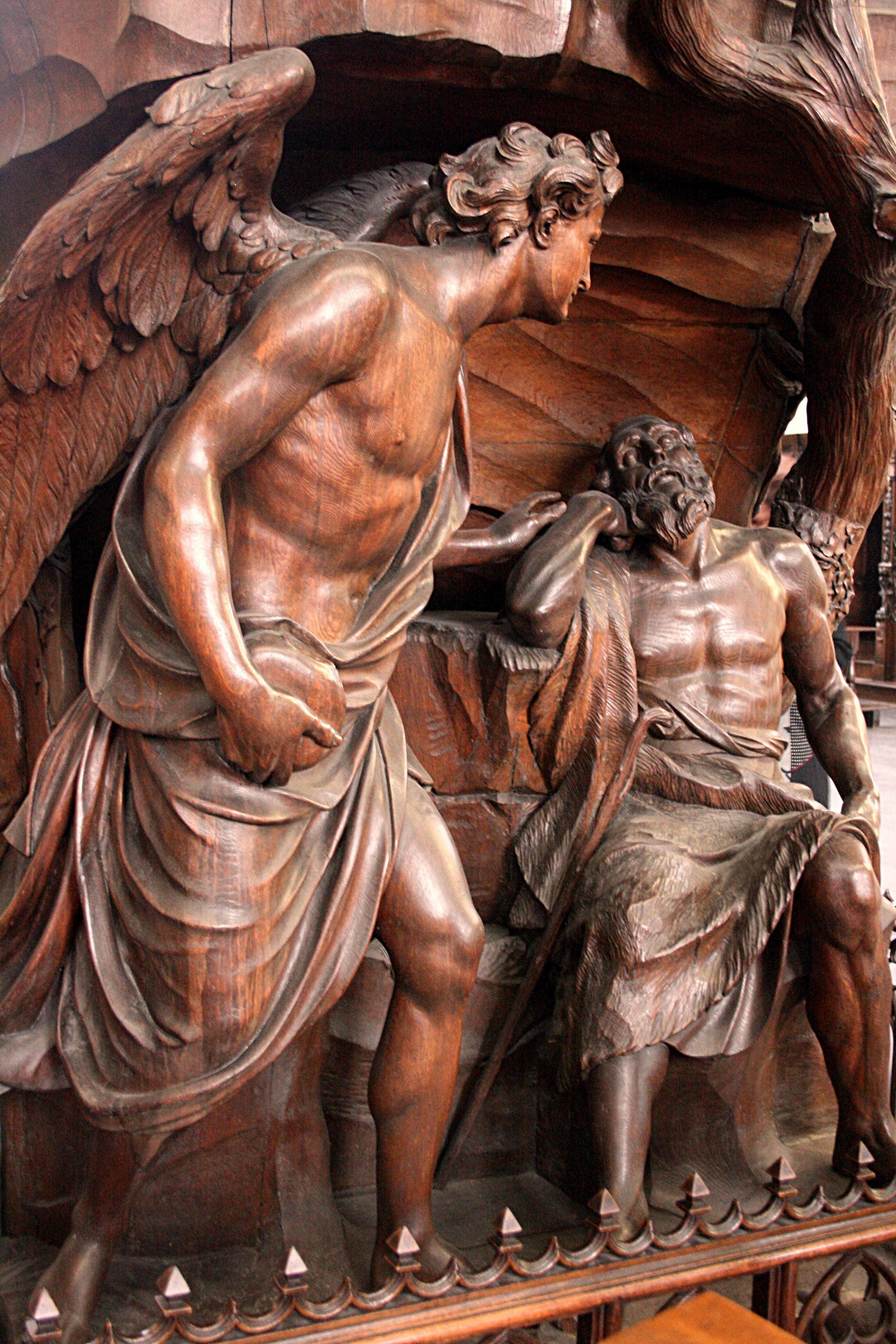 Notre-Dame de la Chapelle, Place de la Chapelle, Bruxelles (Belgique). Détail de la chaire baroque en chêne, œuvre du sculpteur Pierre-Denis Plumier (1721) : Élie nourri par un ange.